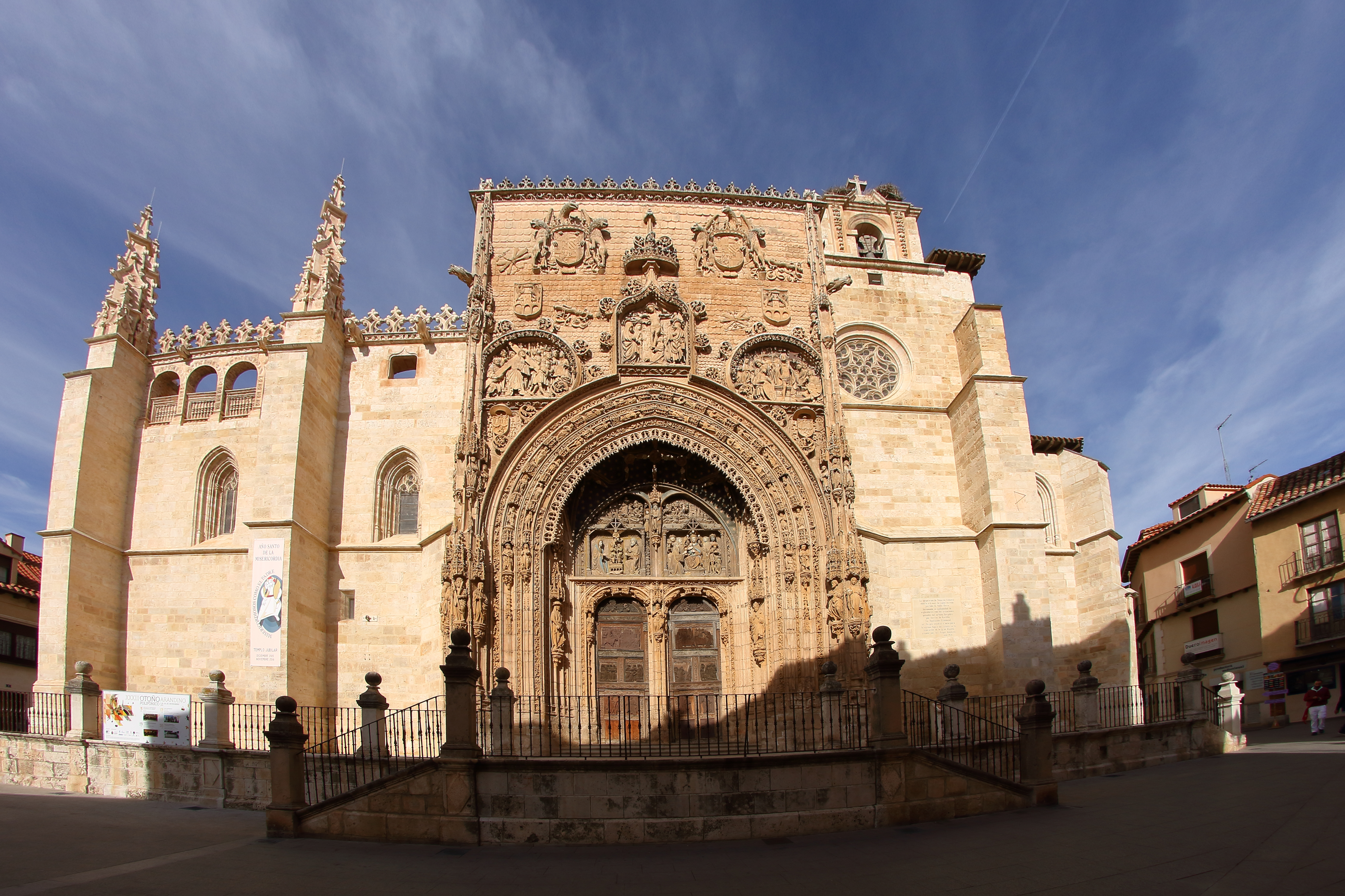 Aranda de Duero, Iglesia de Santa María la Real, fachada principal